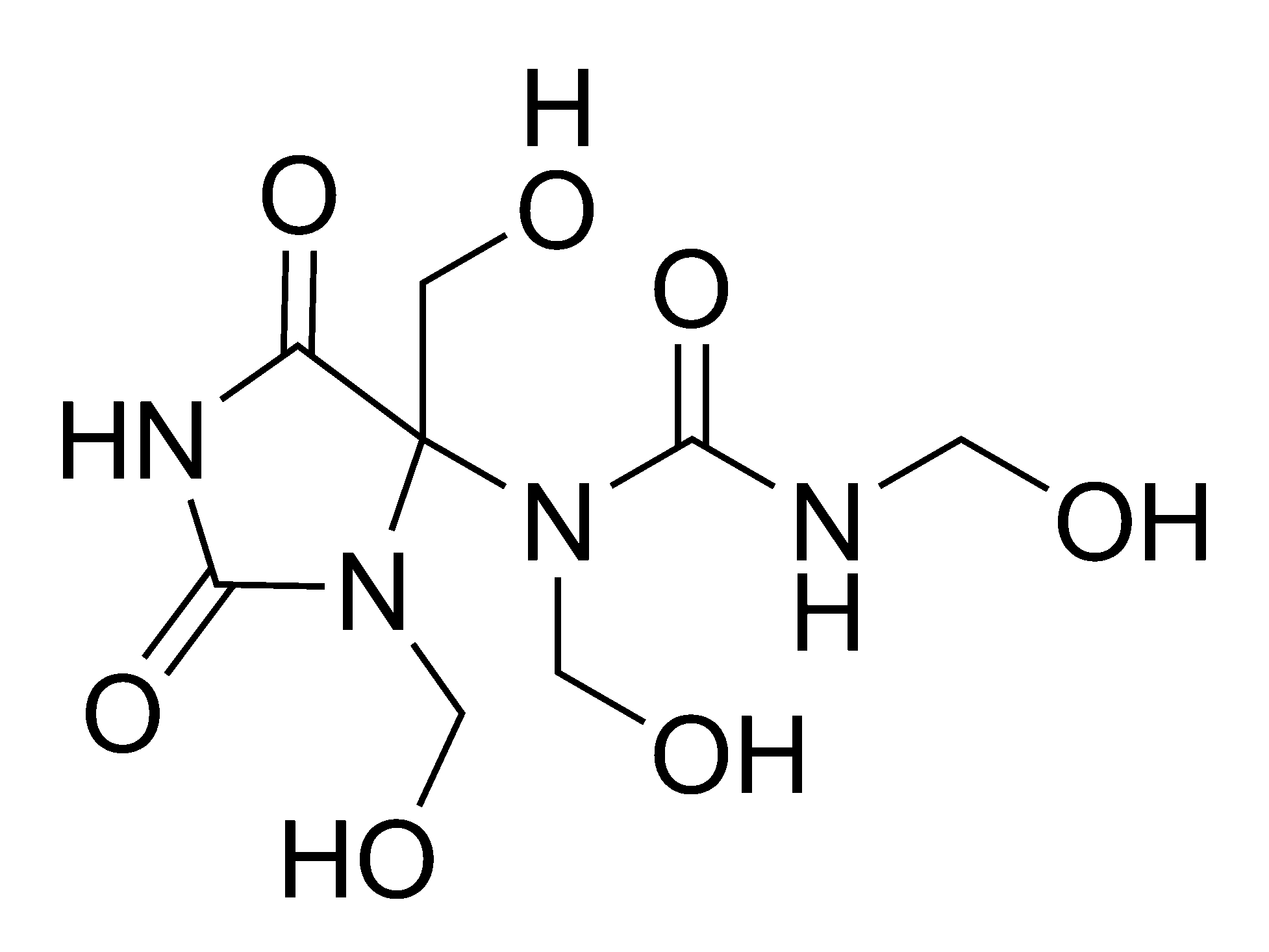 Chemical structure of diazolidinyl urea (correct recent formula)